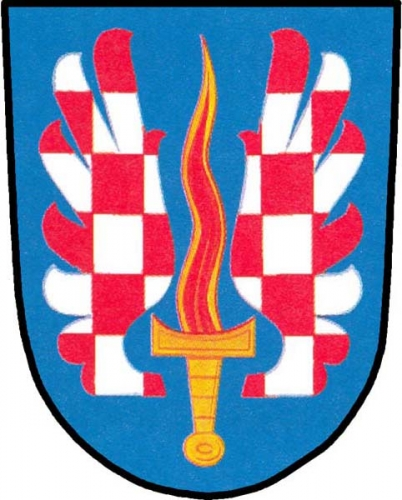 znak, Citonice, okres Znojmo